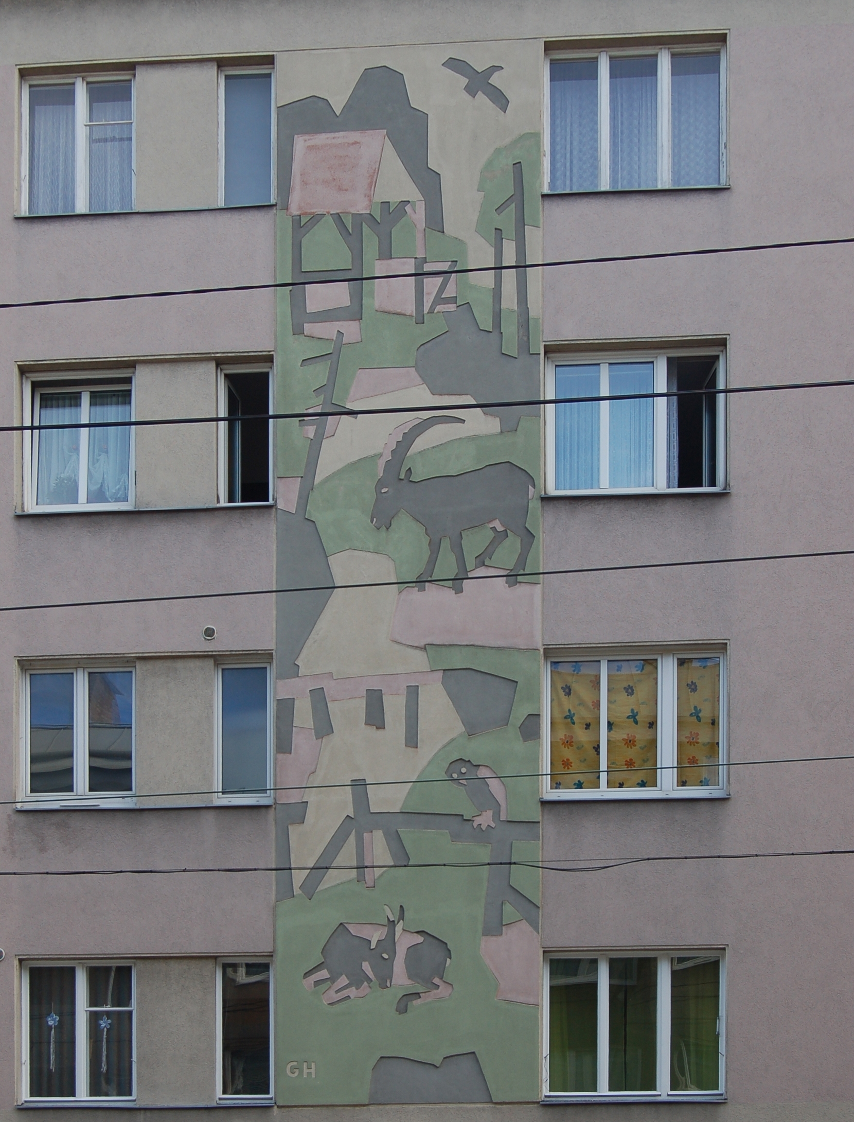 Sgraffito "Dekorative Landschaften mit Tieren" von Gustav Hessing (1959) an der Wohnhausanlage Panikengasse 6-8 in Wien-Ottakring.